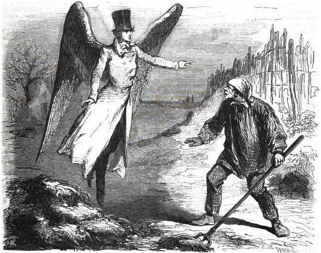 "L'ange donc ordonne à Martin d'aller trouver le roi ..."